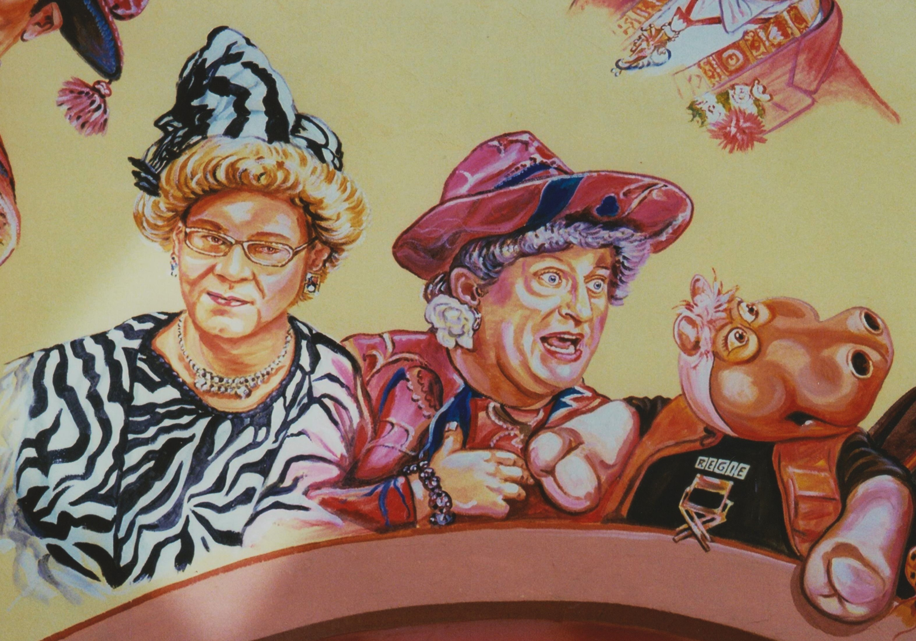 Veitshöchheim, Haus der Fränkischen Fastnacht, Fassadenmalerei (2015) mit Motiven aus der Fernsehsendung „Fastnacht in Franken“: Martin Rassau (links) und Volker Heißmann als „Waltraud und Mariechen“